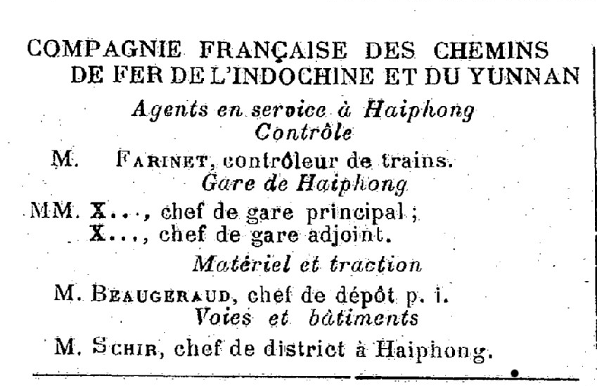 Agents de la gare de Haiphong, d'un annuaire de 1923.